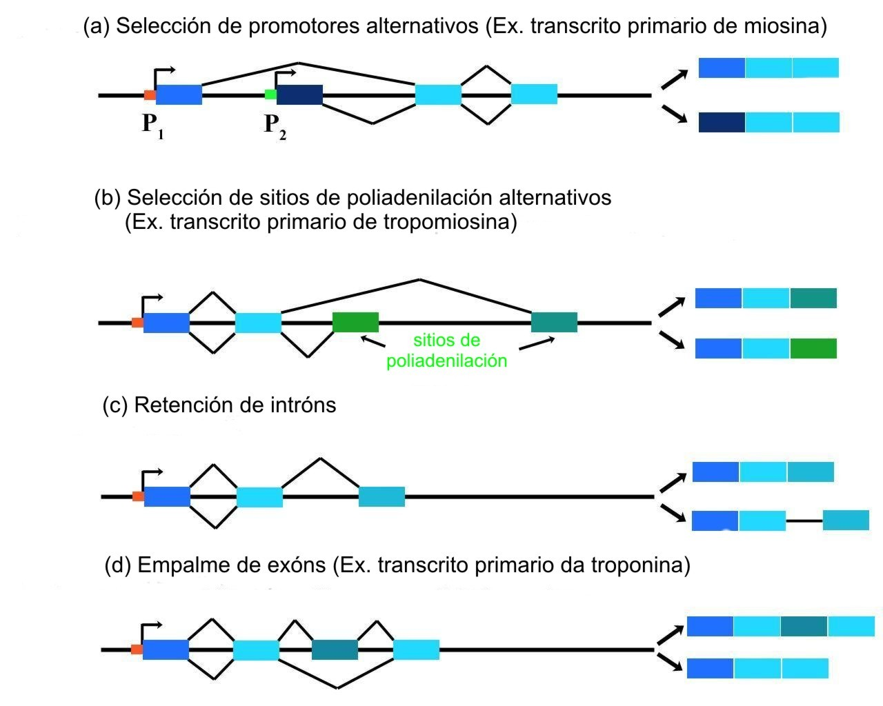 exemplos de splicing alternativo